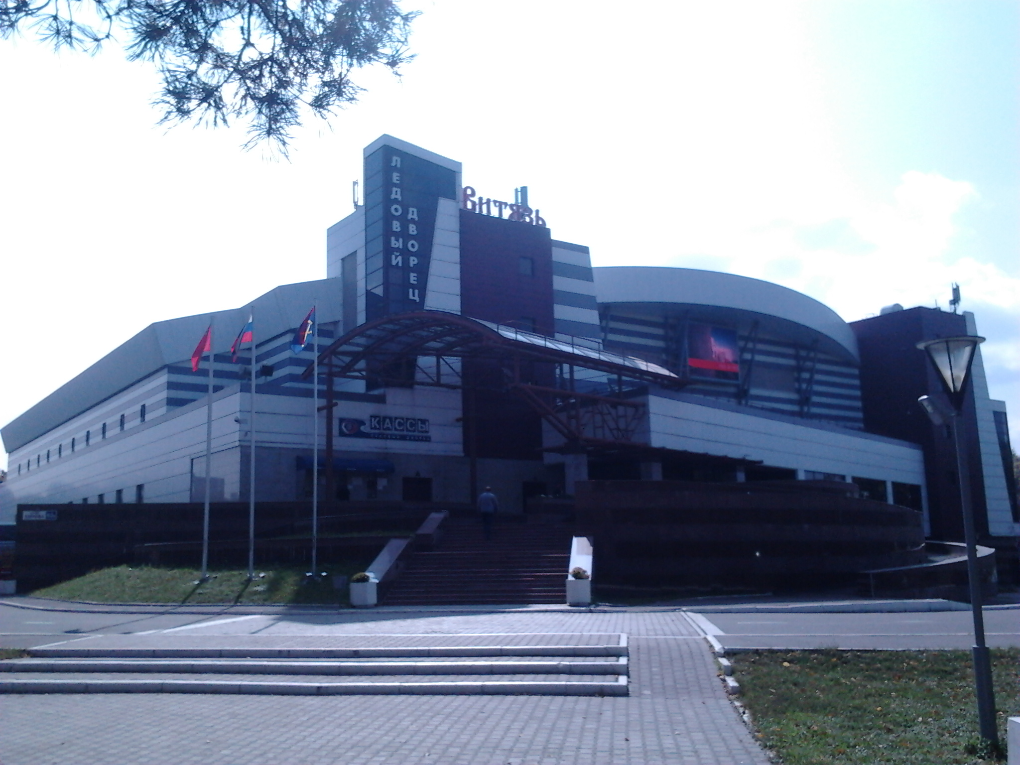 Арена хк Витязь